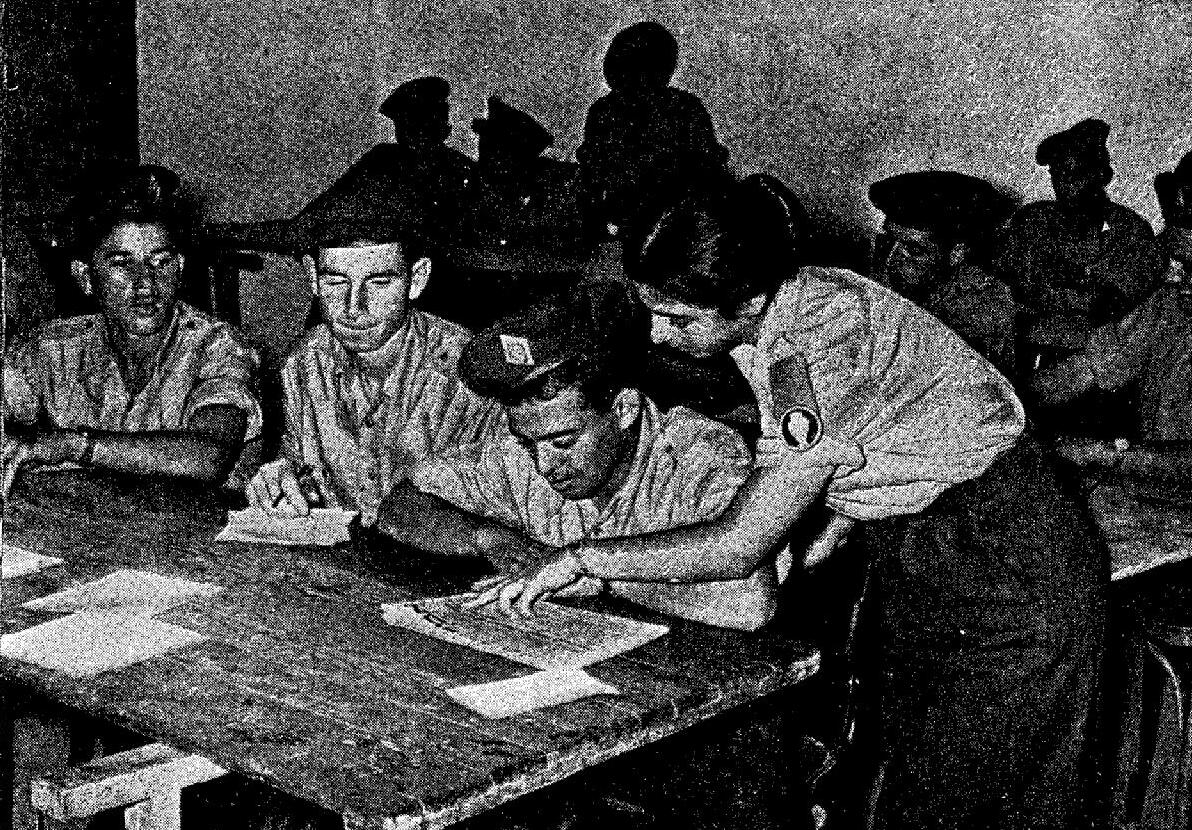 עולים לומדים עברית בבה"ד 4